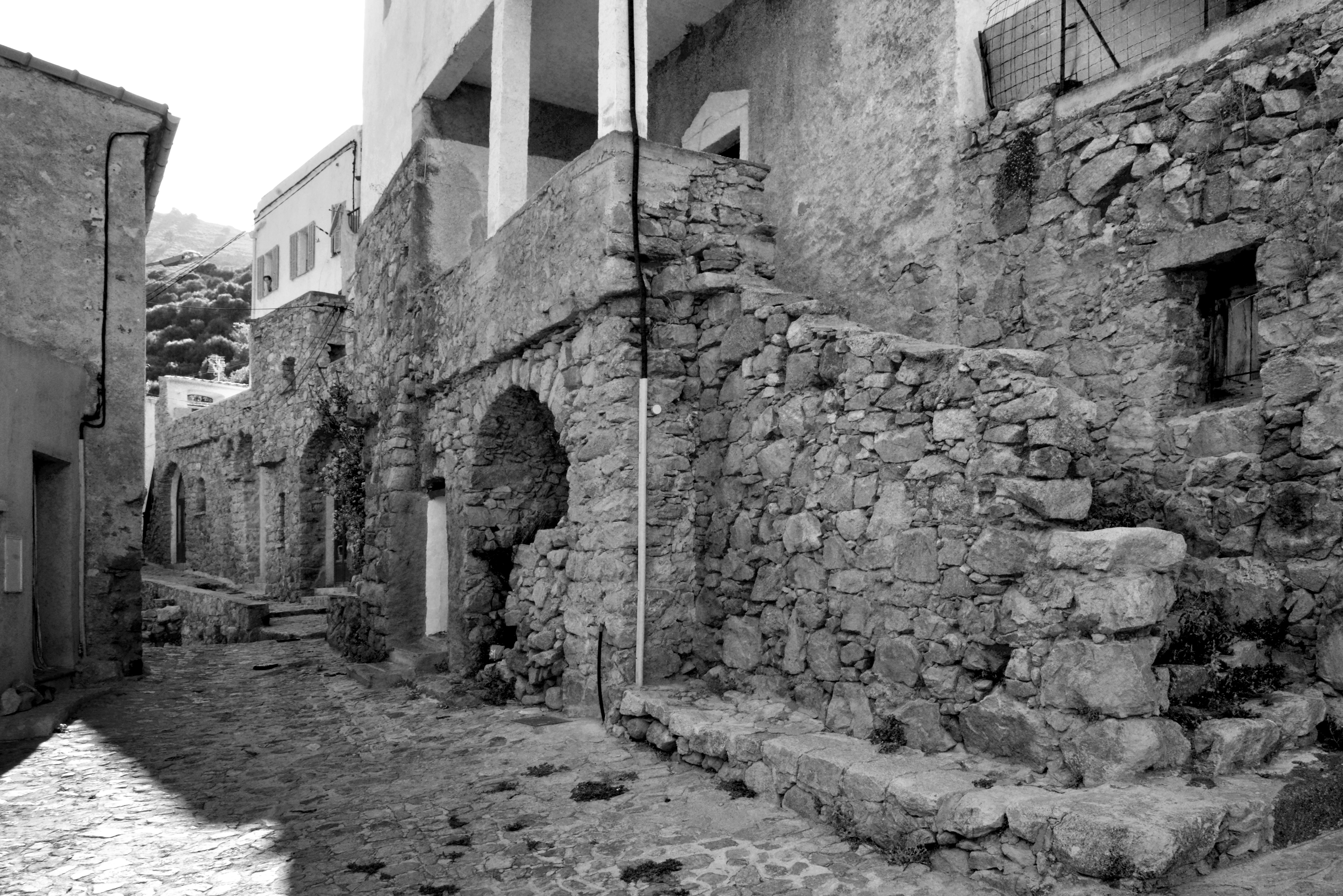 Avapessa, Balagne - (Haute-Corse) - Au cœur du village.